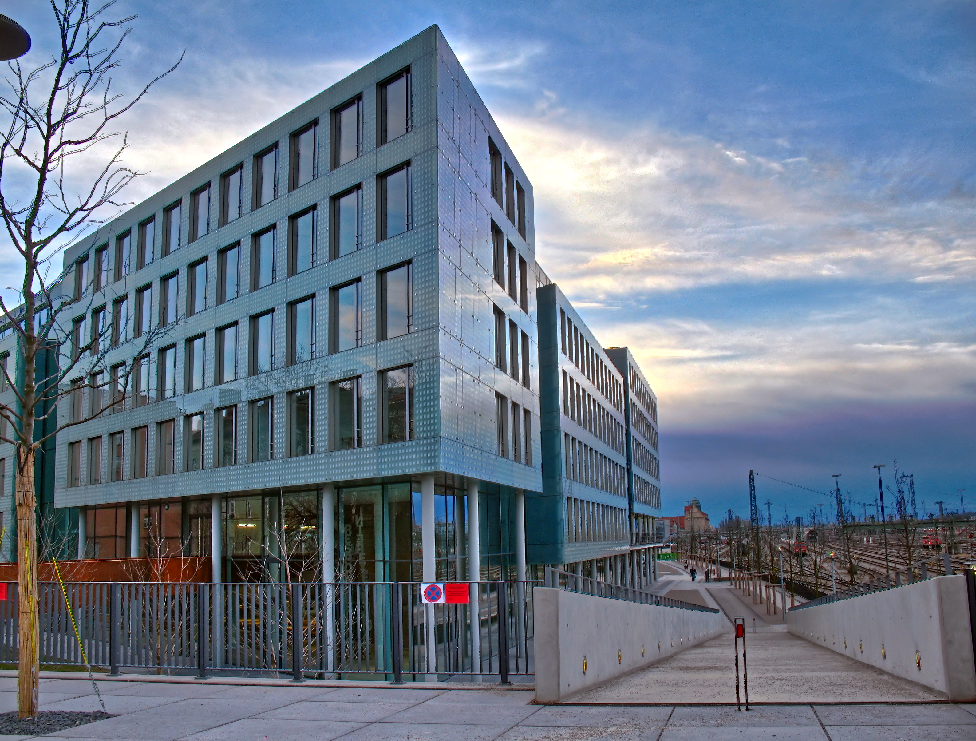 München, Hackerbrücke, Verwaltungsgebäude an der Südseite (HDR-Aufnahme)